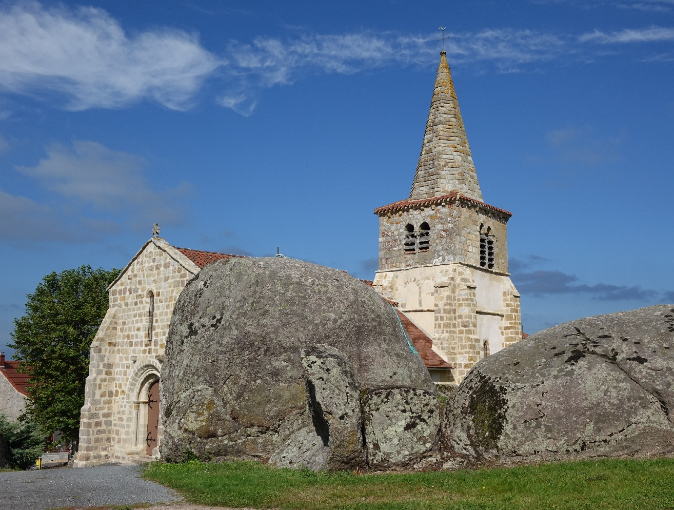 Église Saint-Sulpice